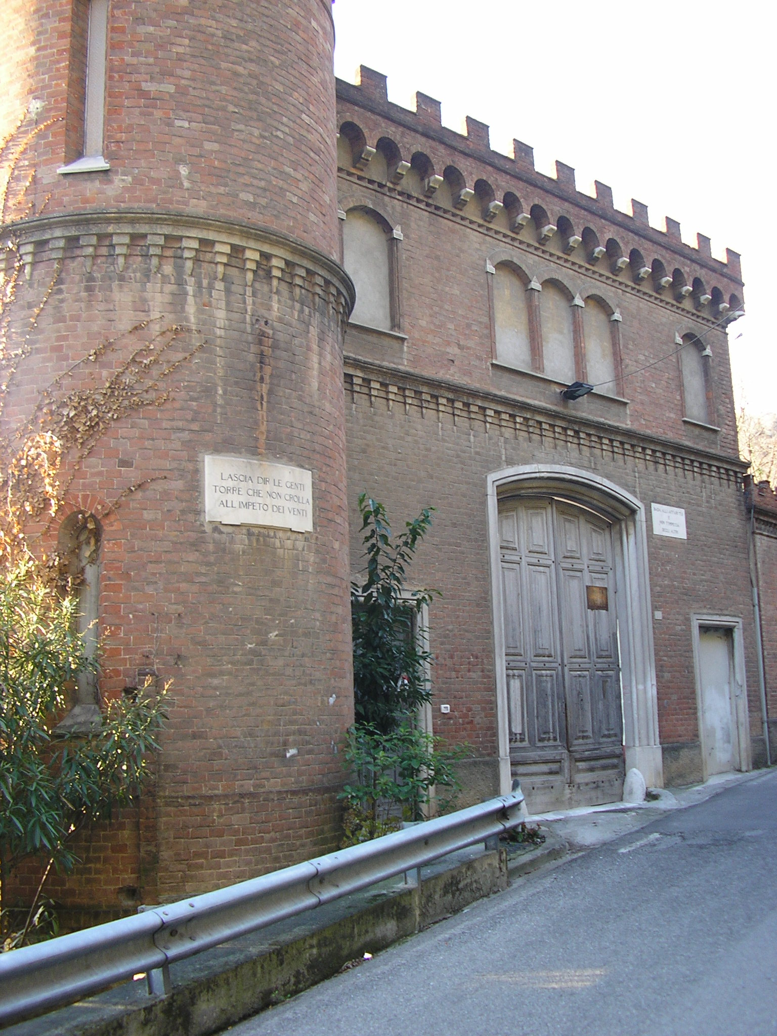 foresteria a Montia (MS) della Villa Fabbricotti